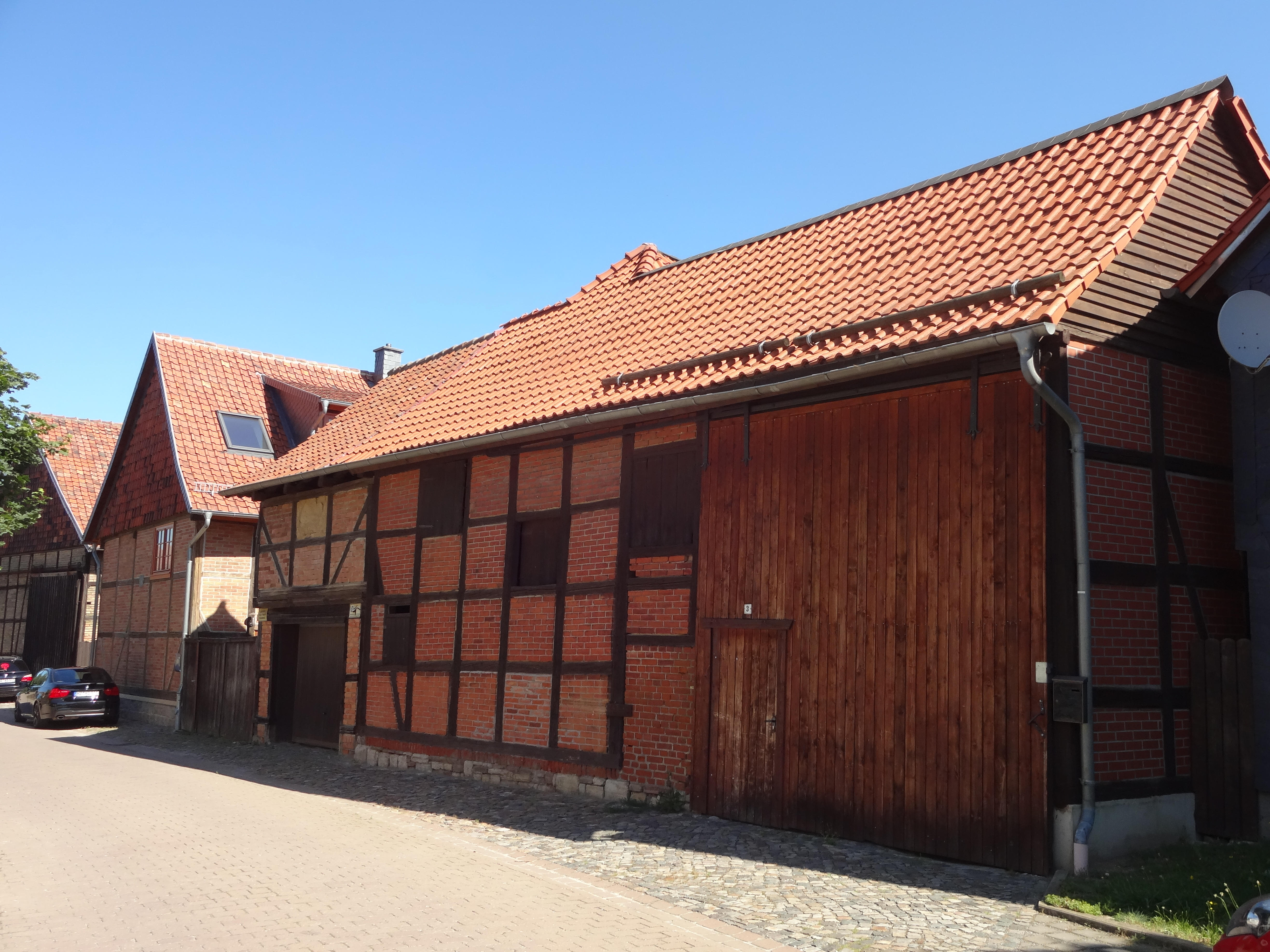 denkmalgeschütztes Bauerngehöft in der Faktoreistraße 3 in Langeln, Gemeinde Nordharz)